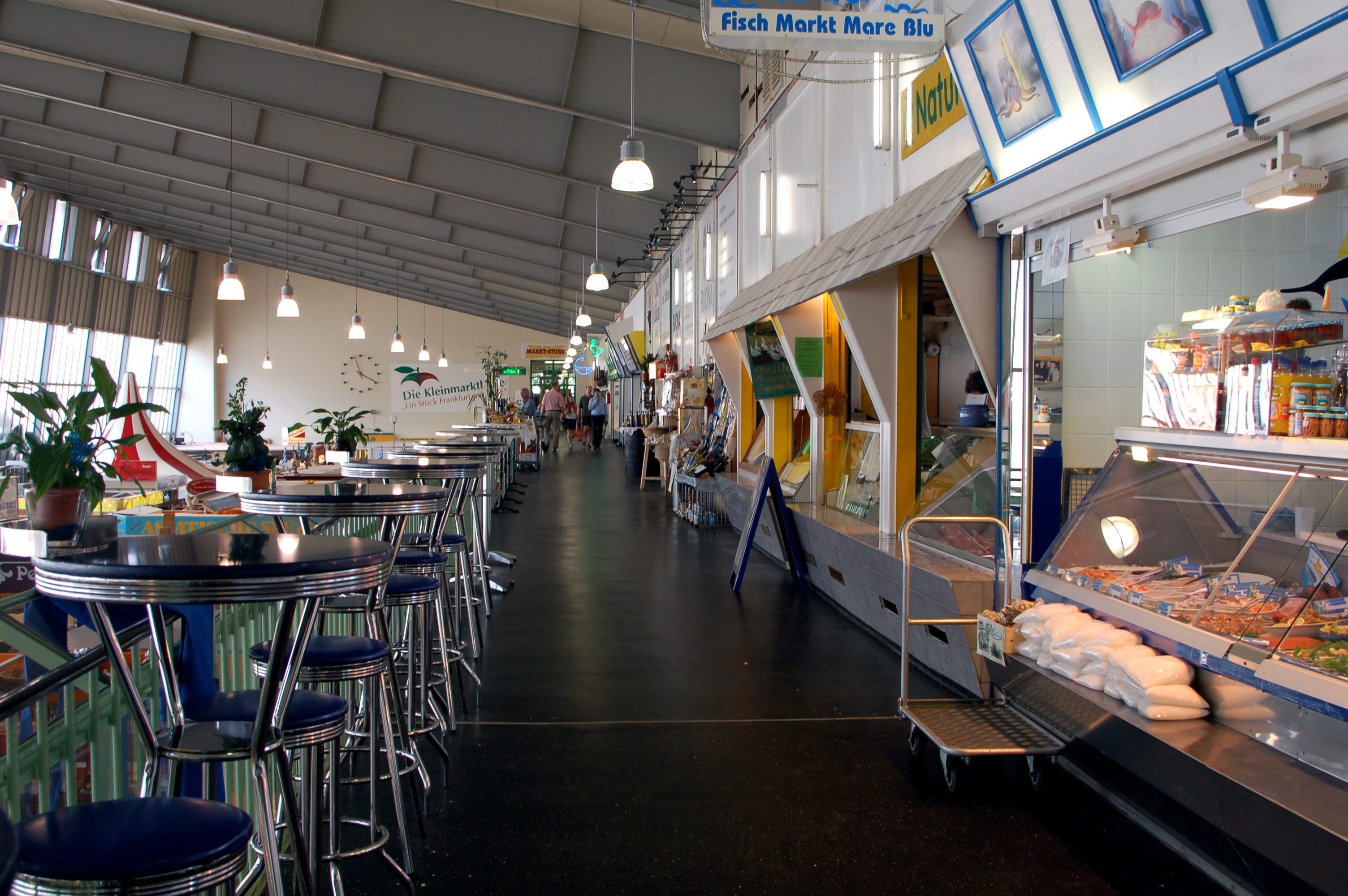 Kleinmarkthalle Frankfurt, Empore